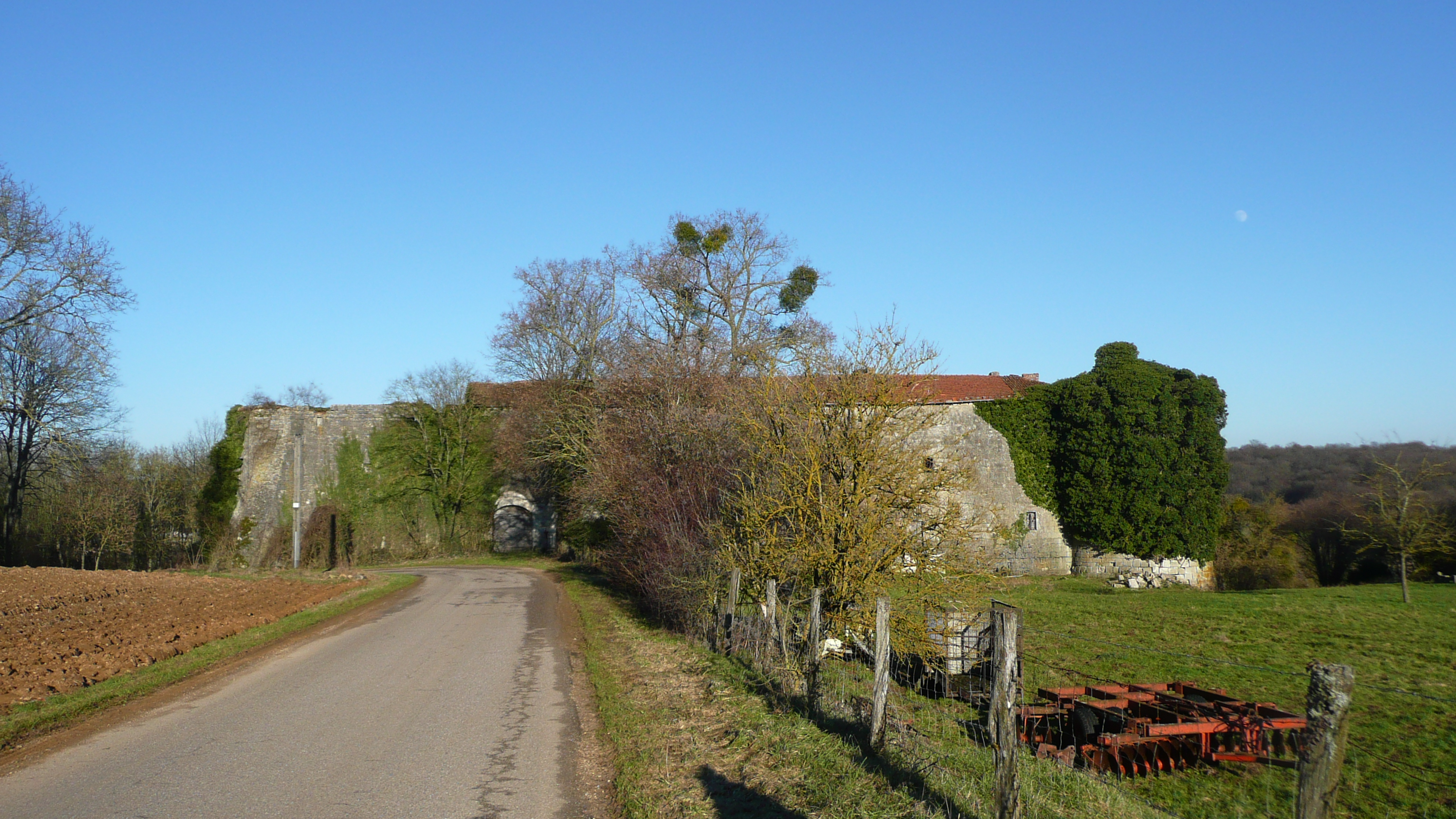 Château de Pierrefort, Martincourt, Meurthe-et-Moselle, France